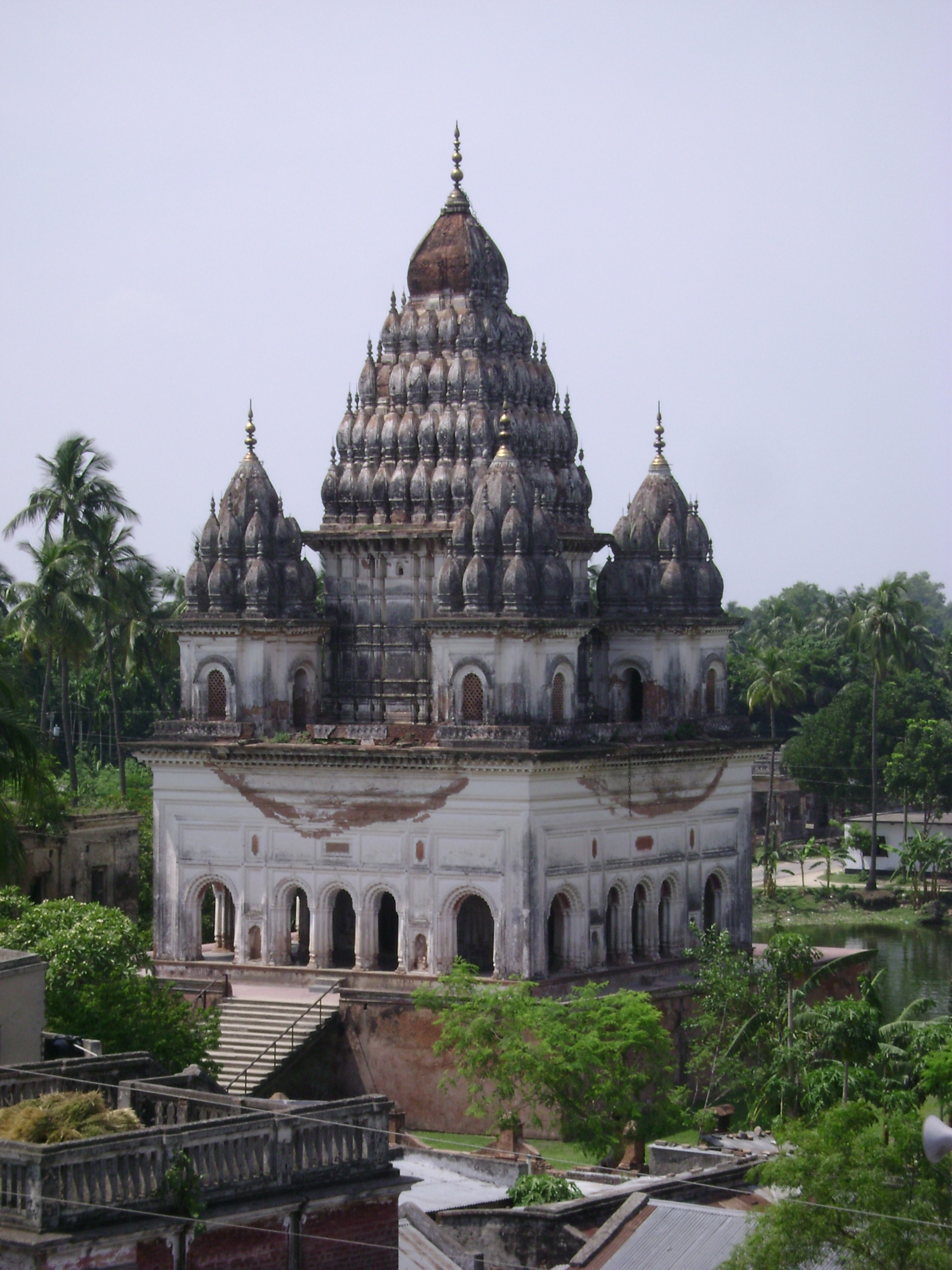 Puthia Mandirs, Chapai Nababgonj, Bangladesh